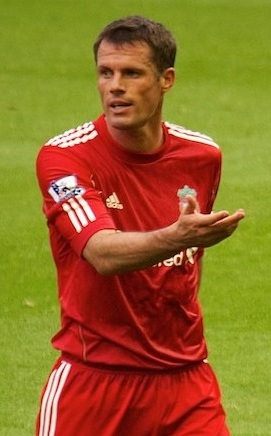 Liverpool vs Bolton 27/08/2011